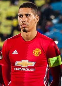 «Манчестер Юнайтед» перед матчем Лиги Европы УЕФА против «Ростова»